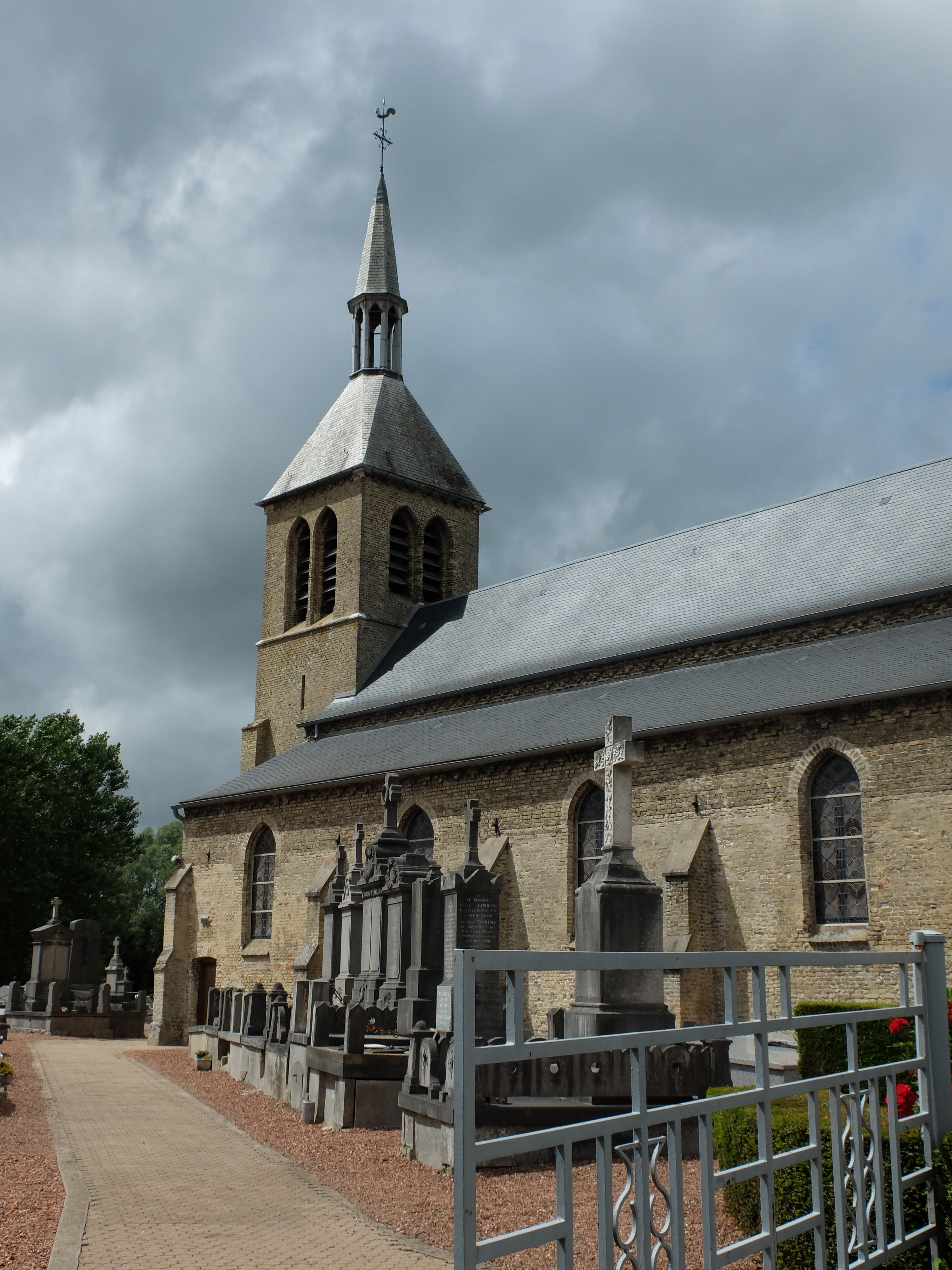 Vue de l'église Saint-Pierre-aux-Liens de Saint-Pierre-Brouck.